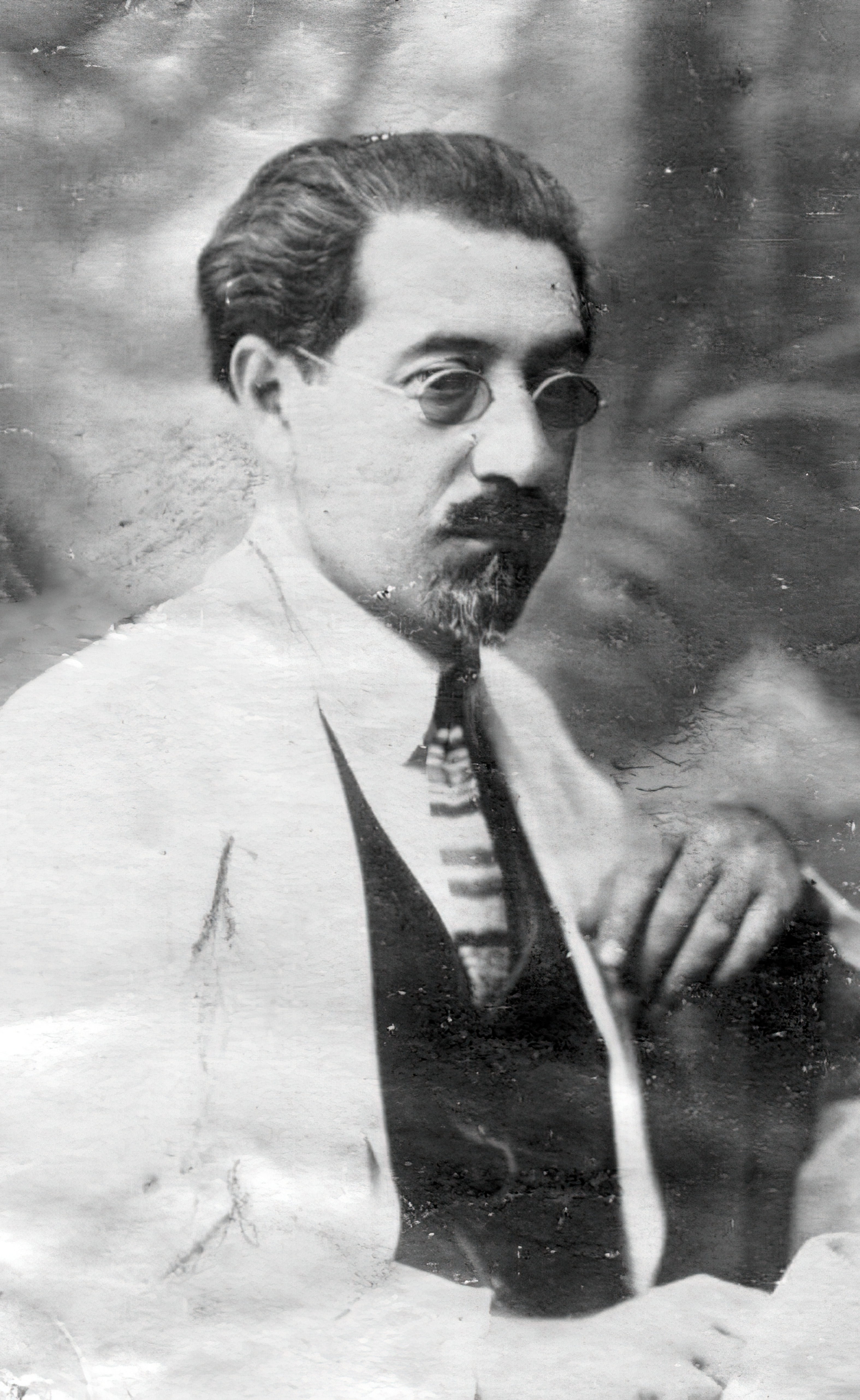 Արմեն Տիգրանյան (Թիֆլիս, 1924)